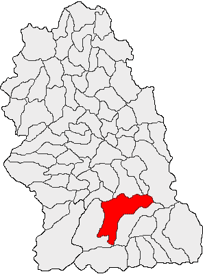 Categorie:Hărţi ale judeţului Hunedoara